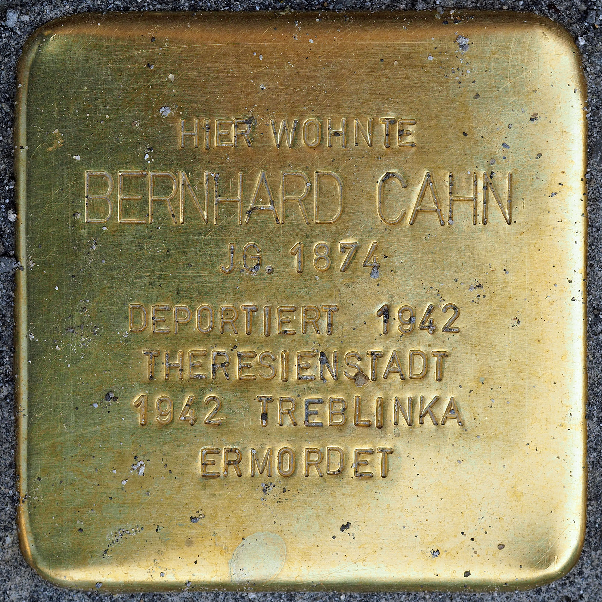 Stolpersteine Schwalmtal: Bernhard Cahn